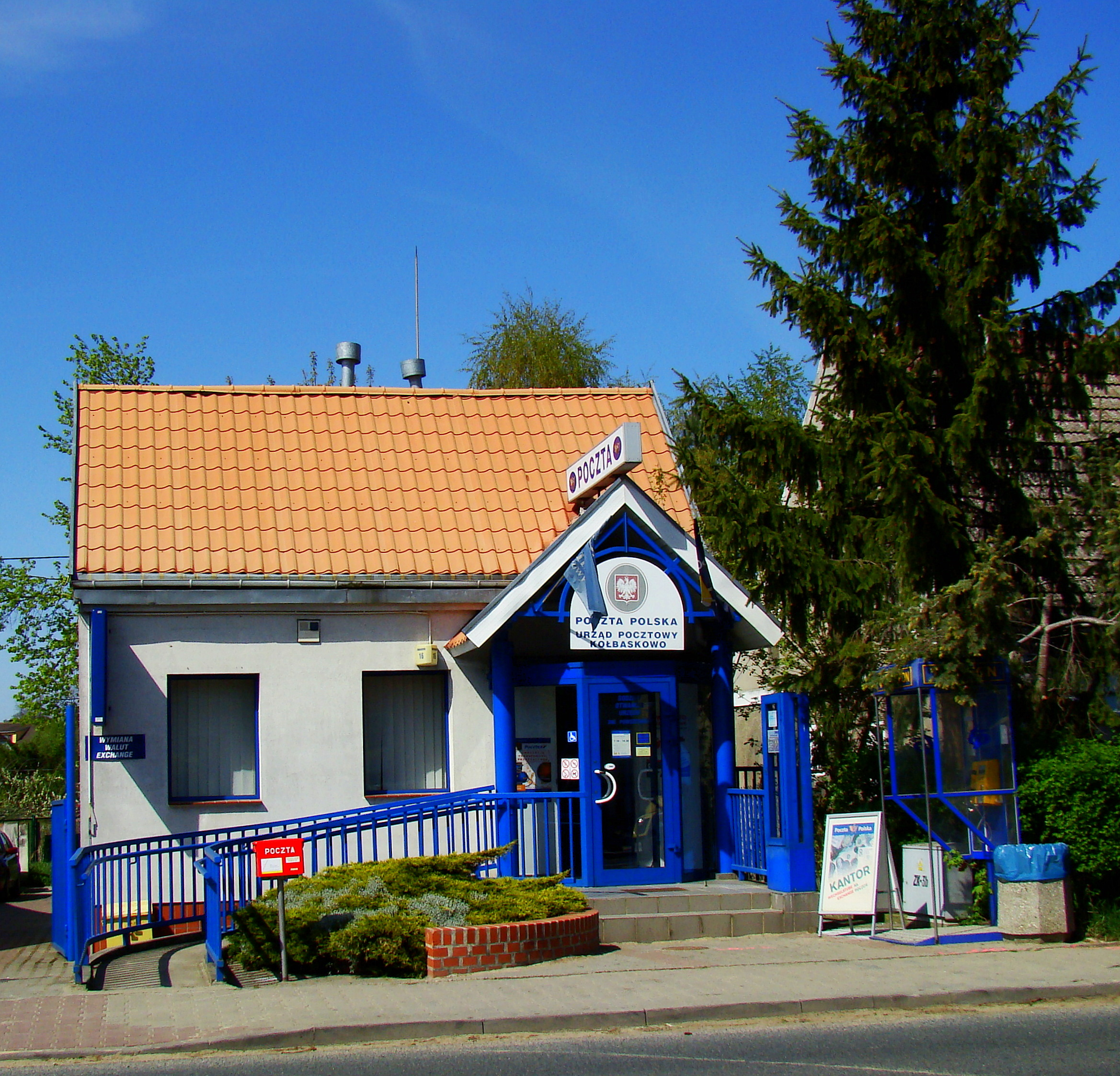 Kołbaskowo, Urząd pocztowy, (Gmina Kołbaskowo, Powiat policki, Województwo zachodniopomorskie), Polska